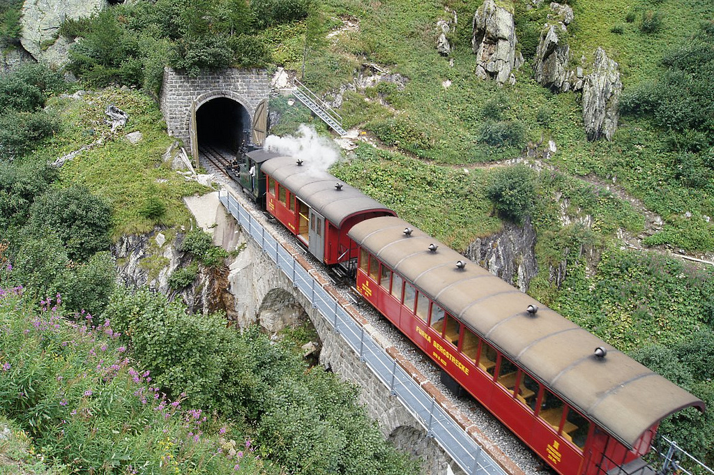 Maquette de train ou réalité?